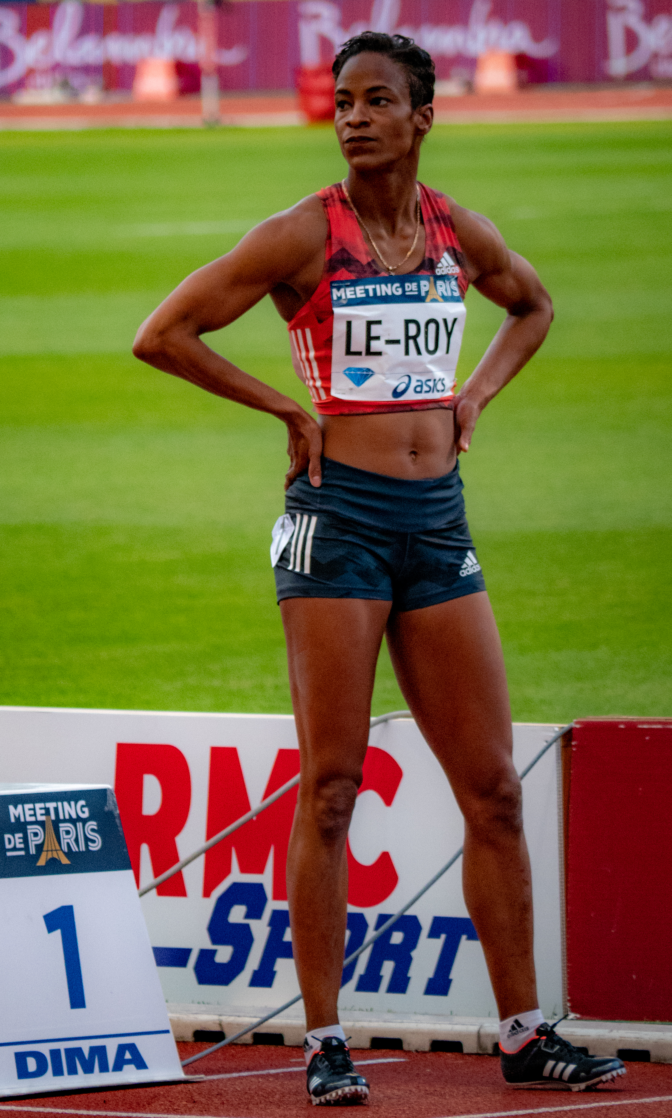 Anastasia Le-Roy